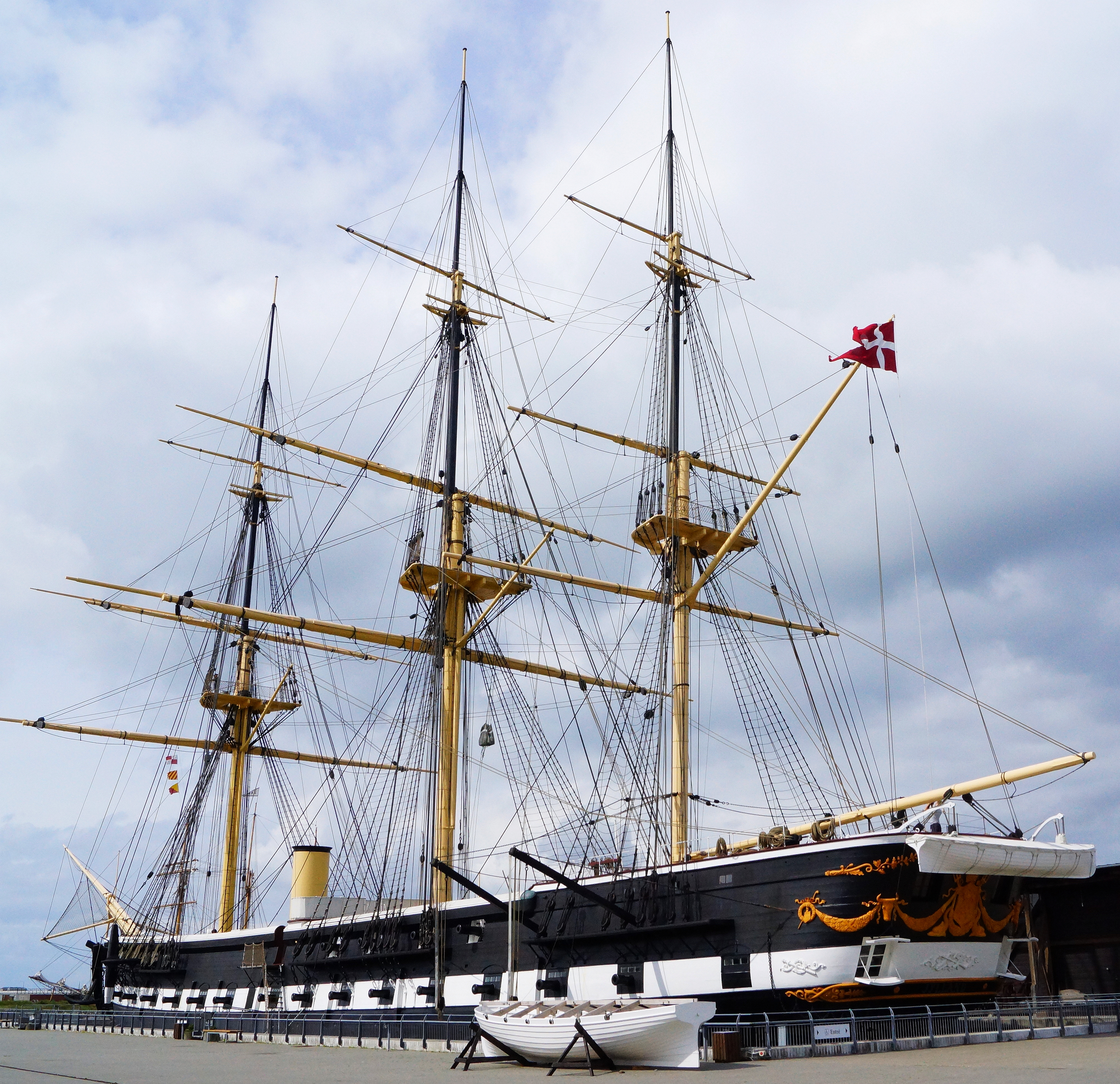 Fregatten Jylland total